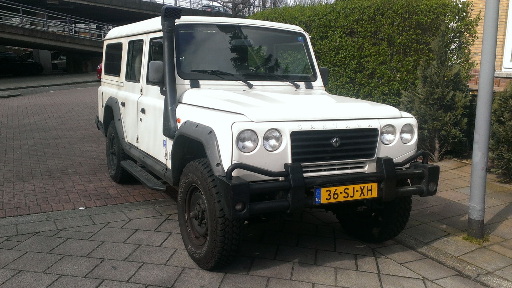 Santana PS-10 5-door model